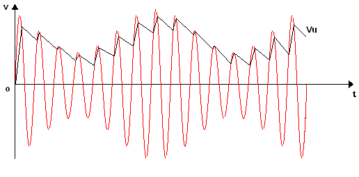 Représentation de la démodulation à l'aide d'un détecteur d'enveloppe, le signal rouge est la porteuse, celui noir est le signal de sortie qui correspond à l'enveloppe